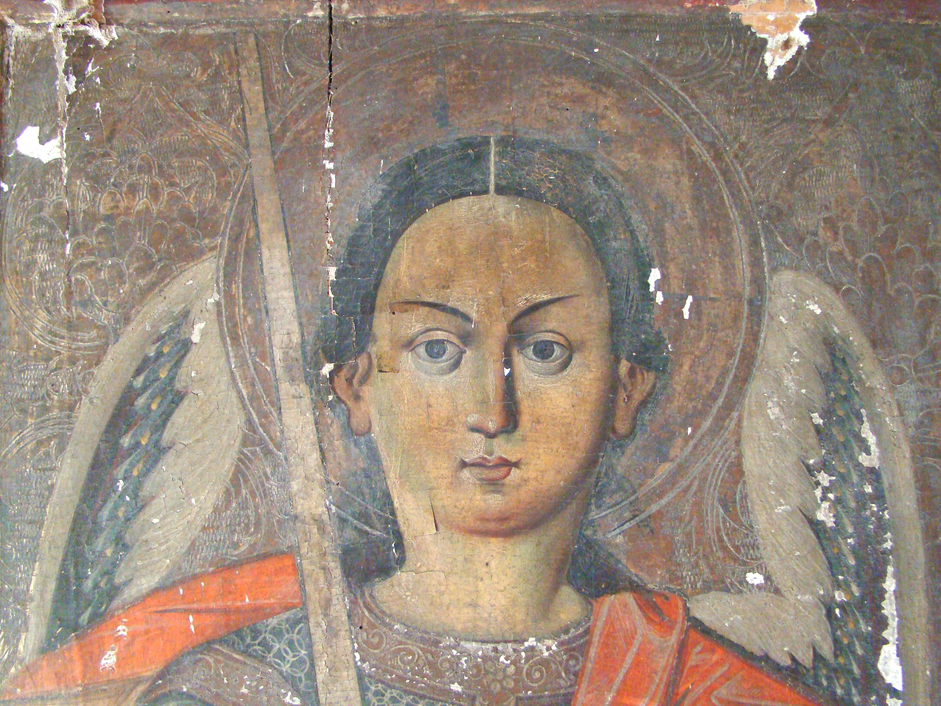 Biserica de lemn „Sf.Arhangheli” din Boiereni, județul Maramureș